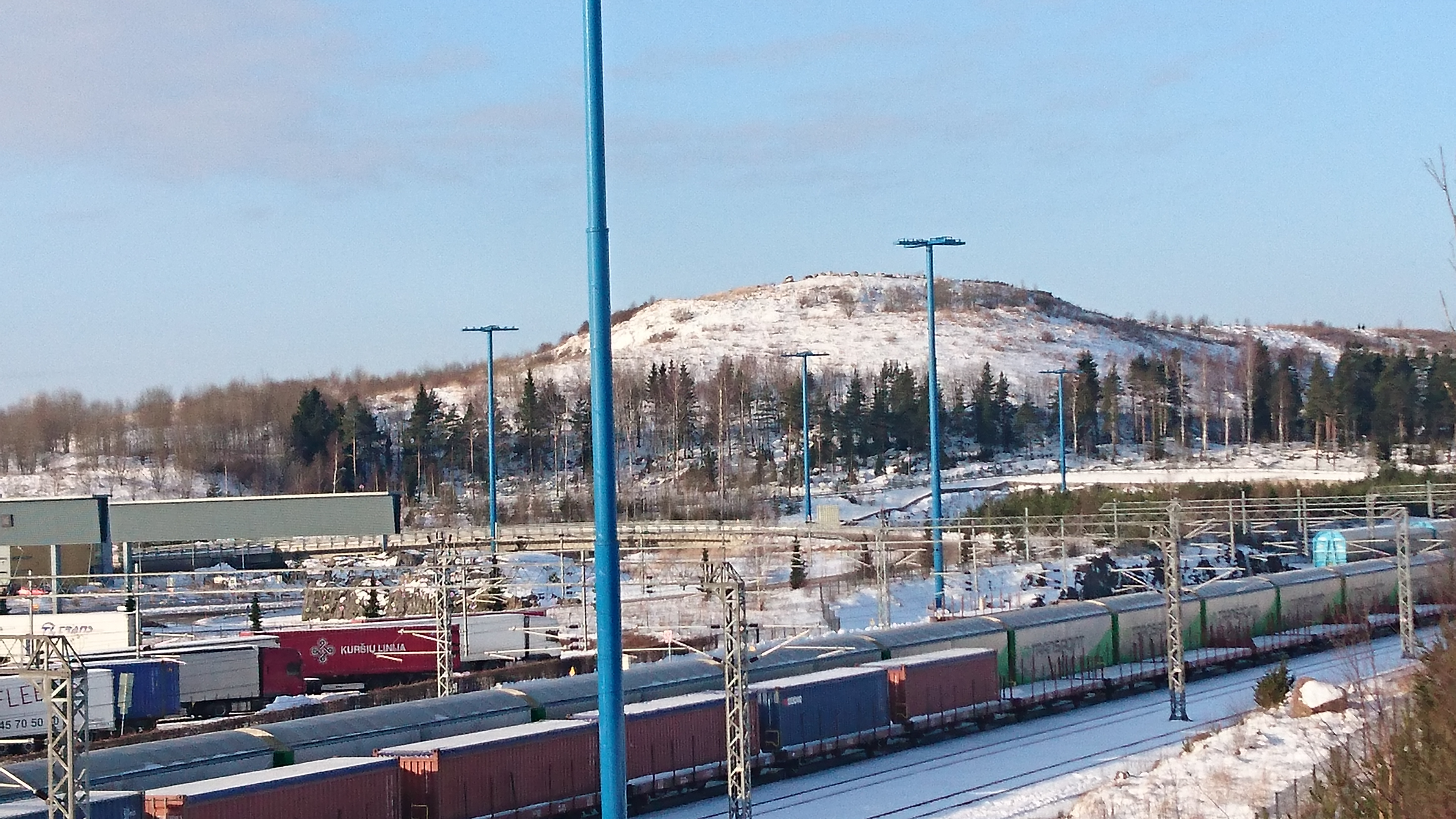 Vuosaarenhuippu kuvattuna Fotängeninmäeltä.